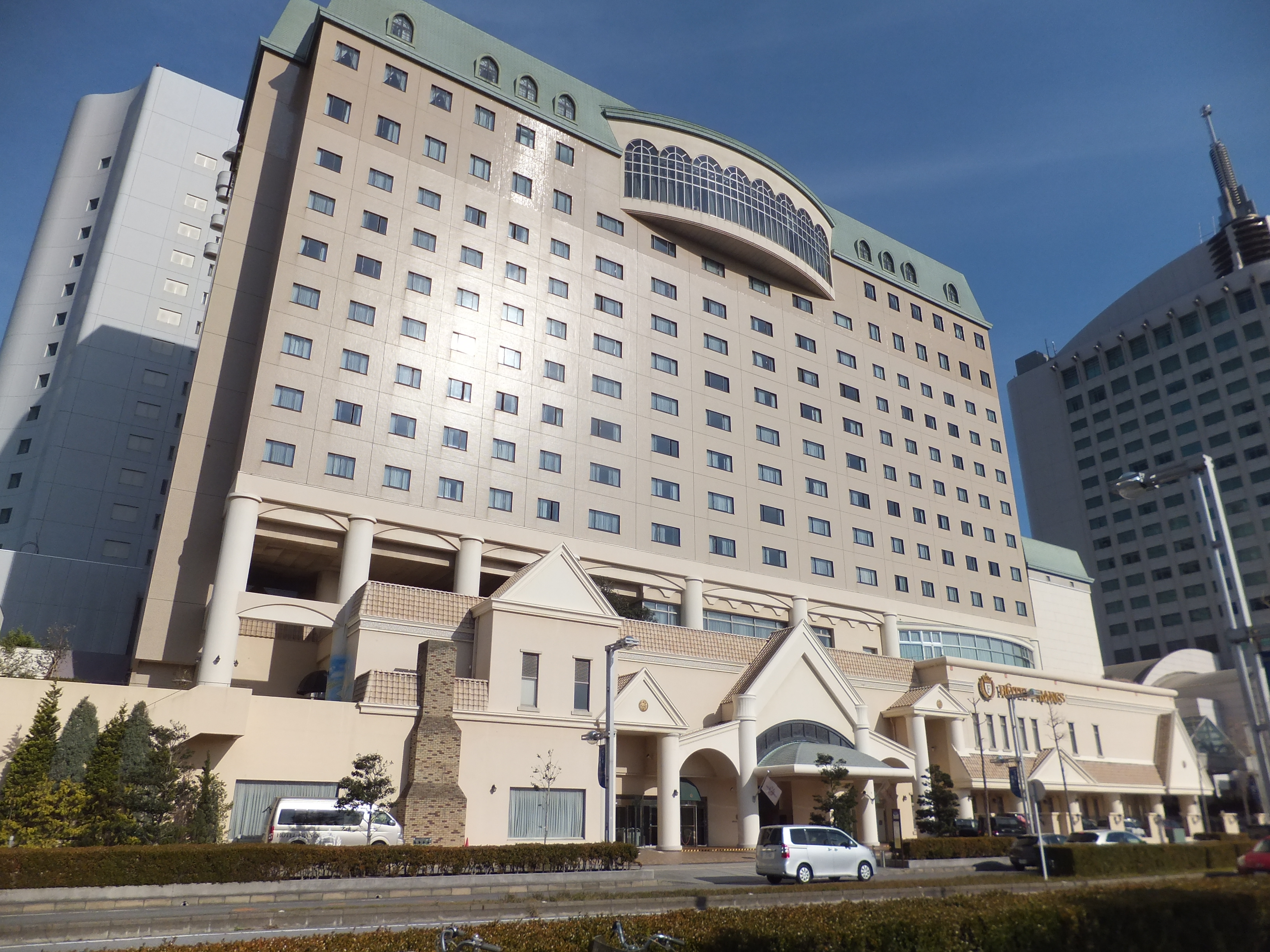 ホテルフランクス（千葉市美浜区、幕張新都心）